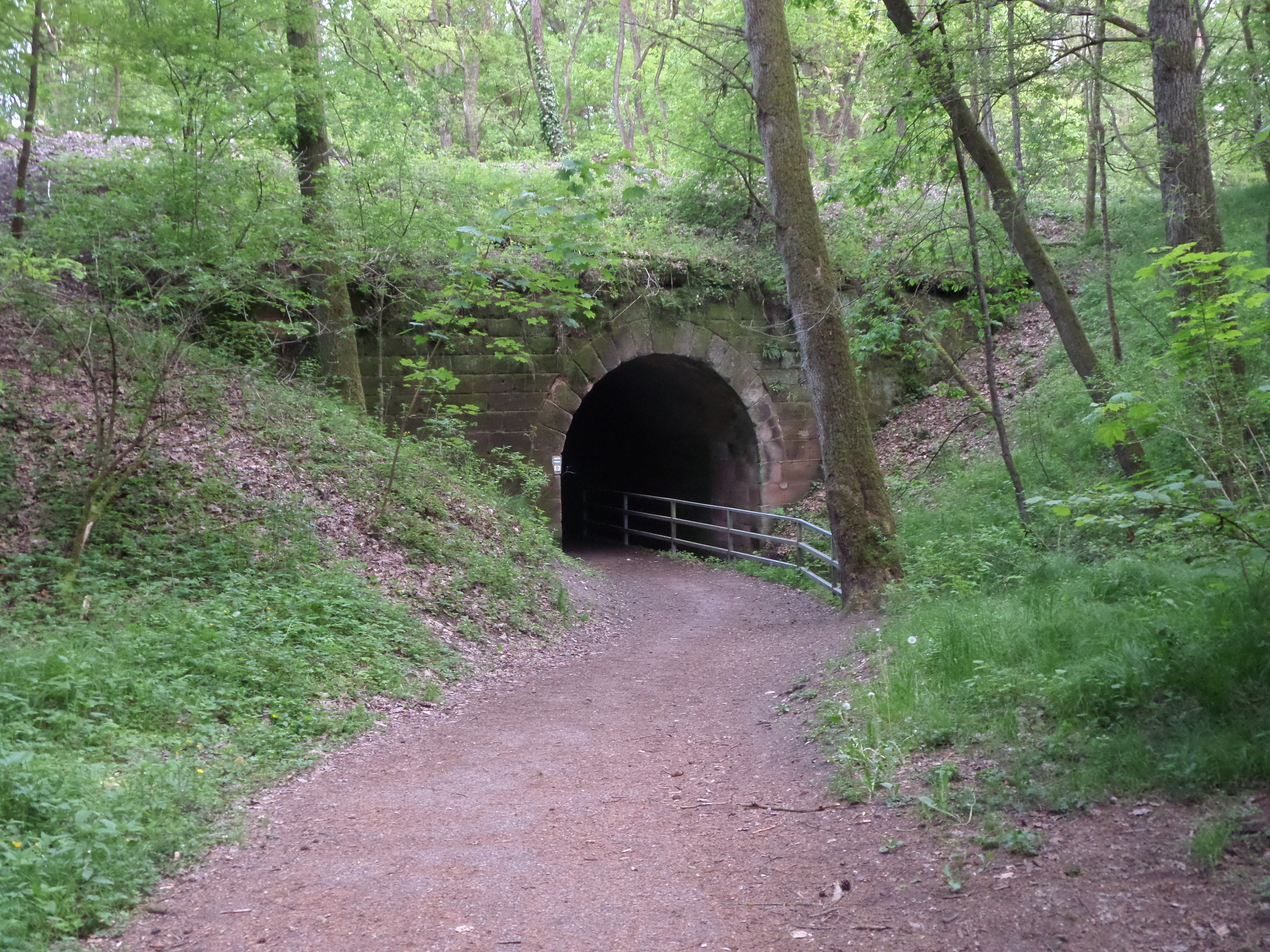 Ringbahnbrücke (Tiefgraben)